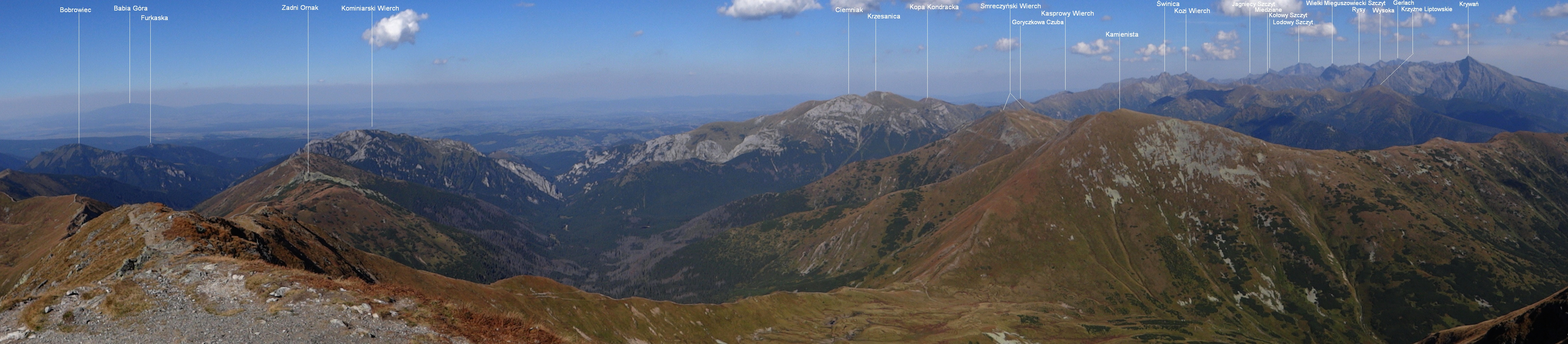 Panorama z Bystrej w kierunku północnym i wschodnim